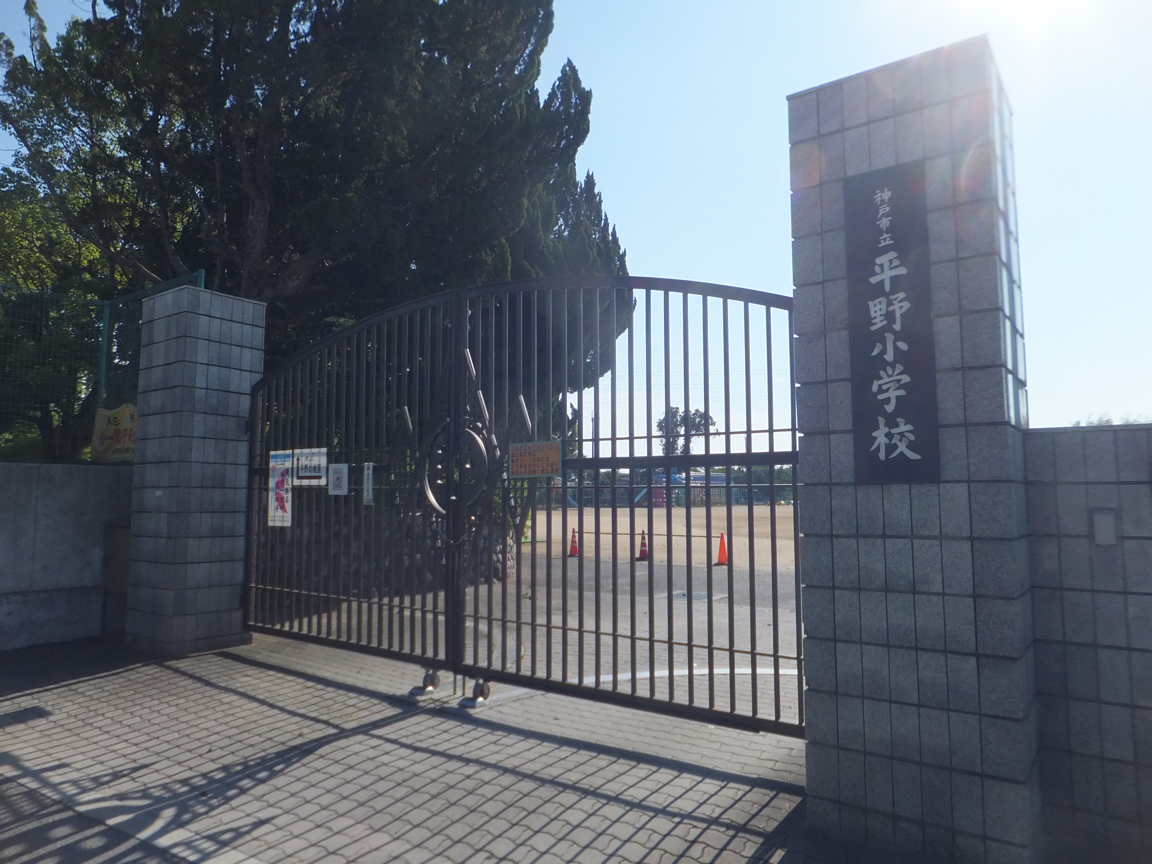 神戸市立平野小学校正門